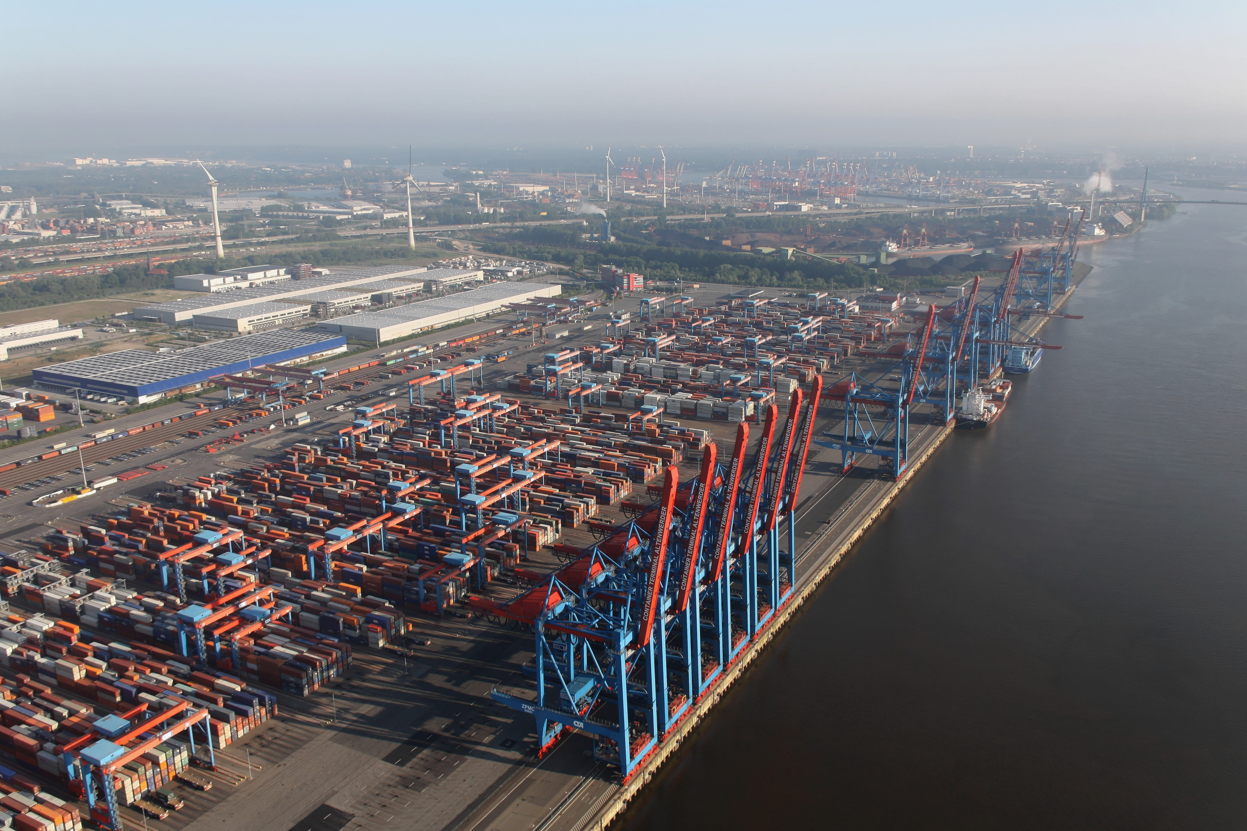 Hamburger Hafen, Container Terminal Altenwerder